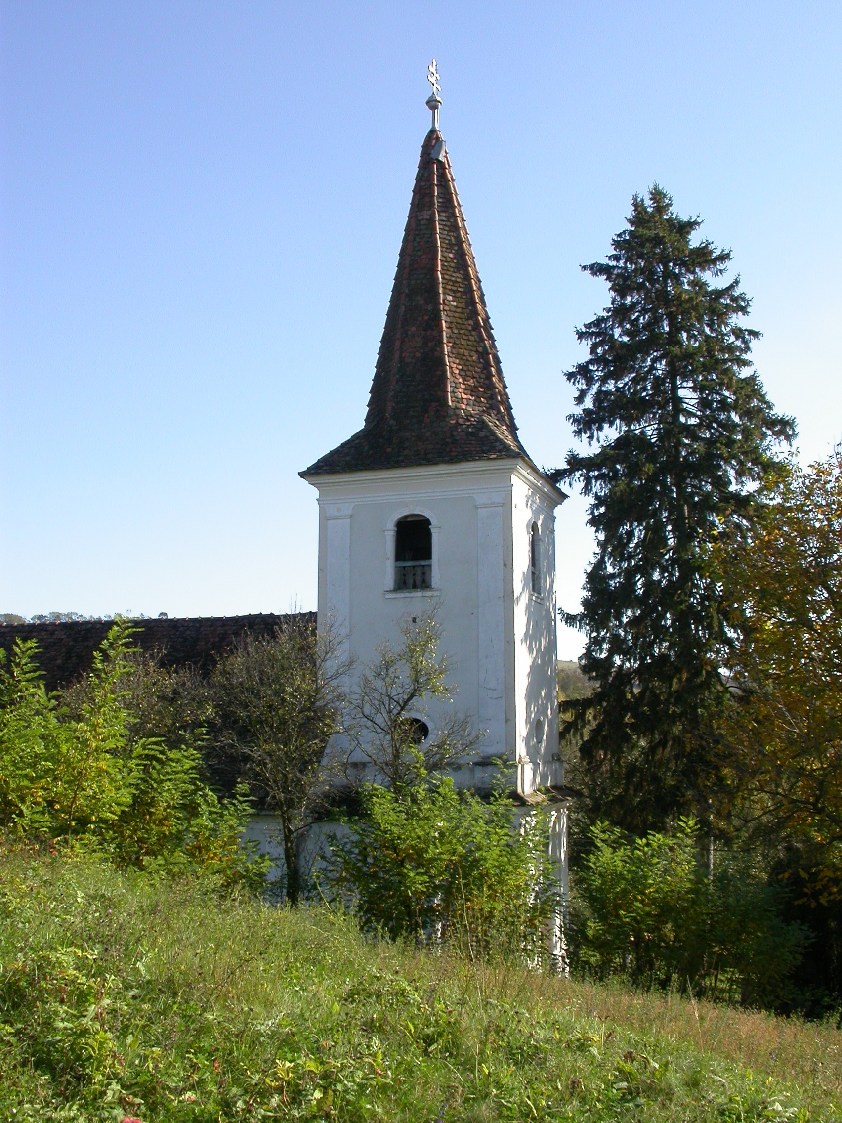 Biserica " Sf. Nicolae" 1826 - 1836